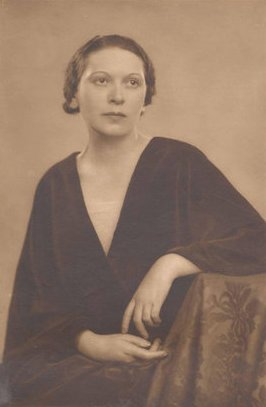 Peéry Piri (1904-1962) magyar színésznő, író, forgatókönyvíró, műfordító kb. 30 éves korában.